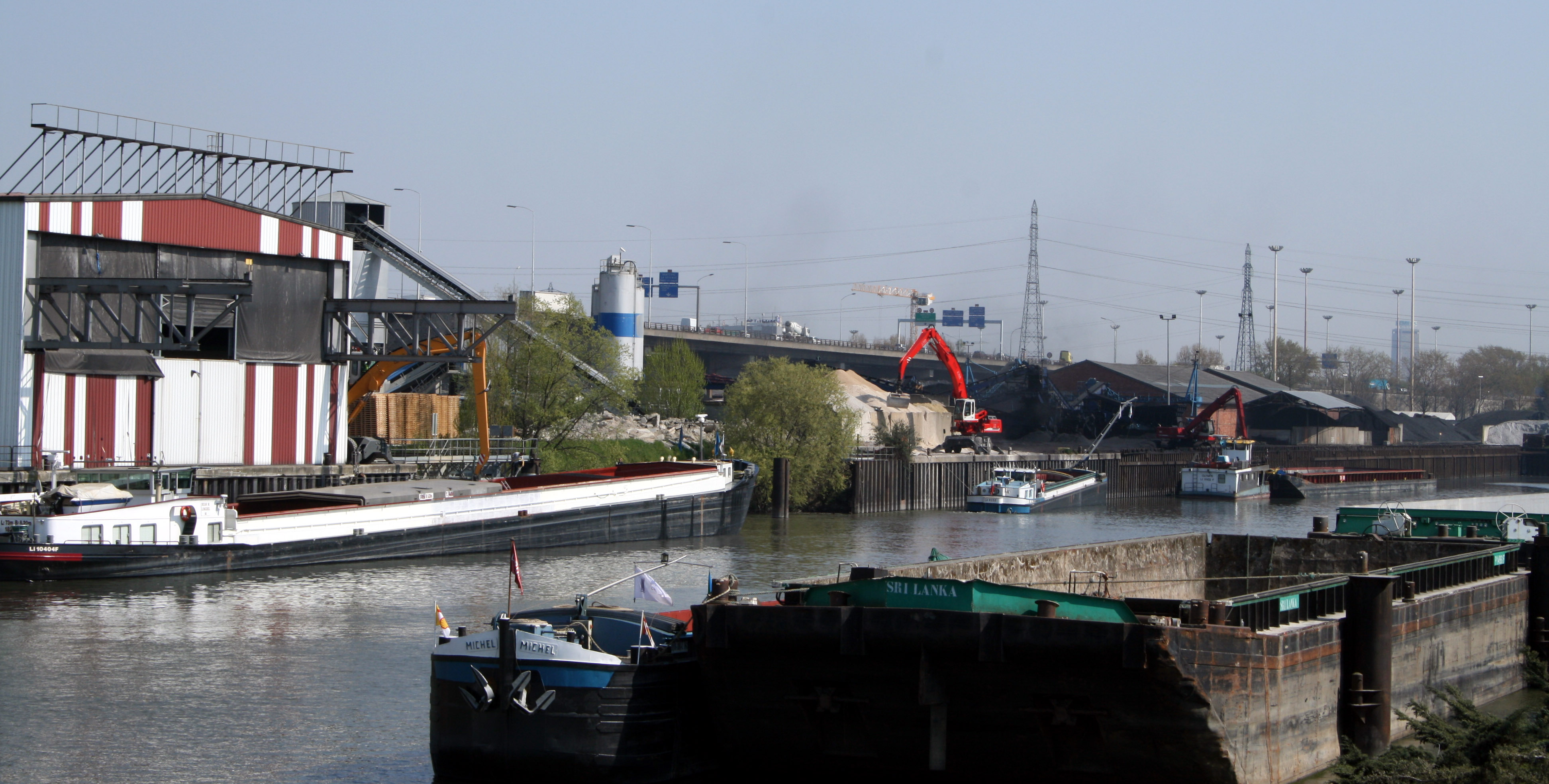 Port de Gennevilliers